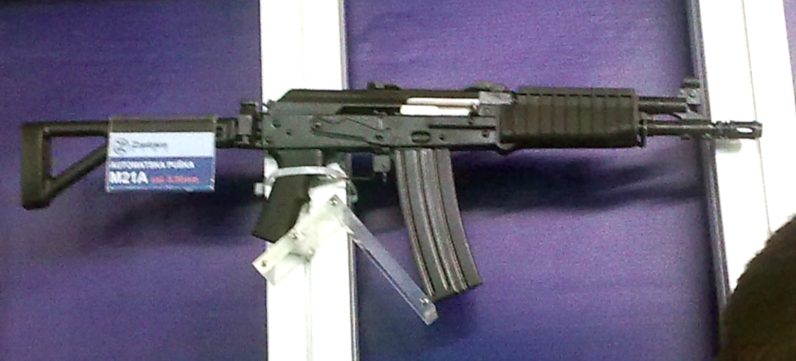 М21 А, кратка верзија јуришне пушке